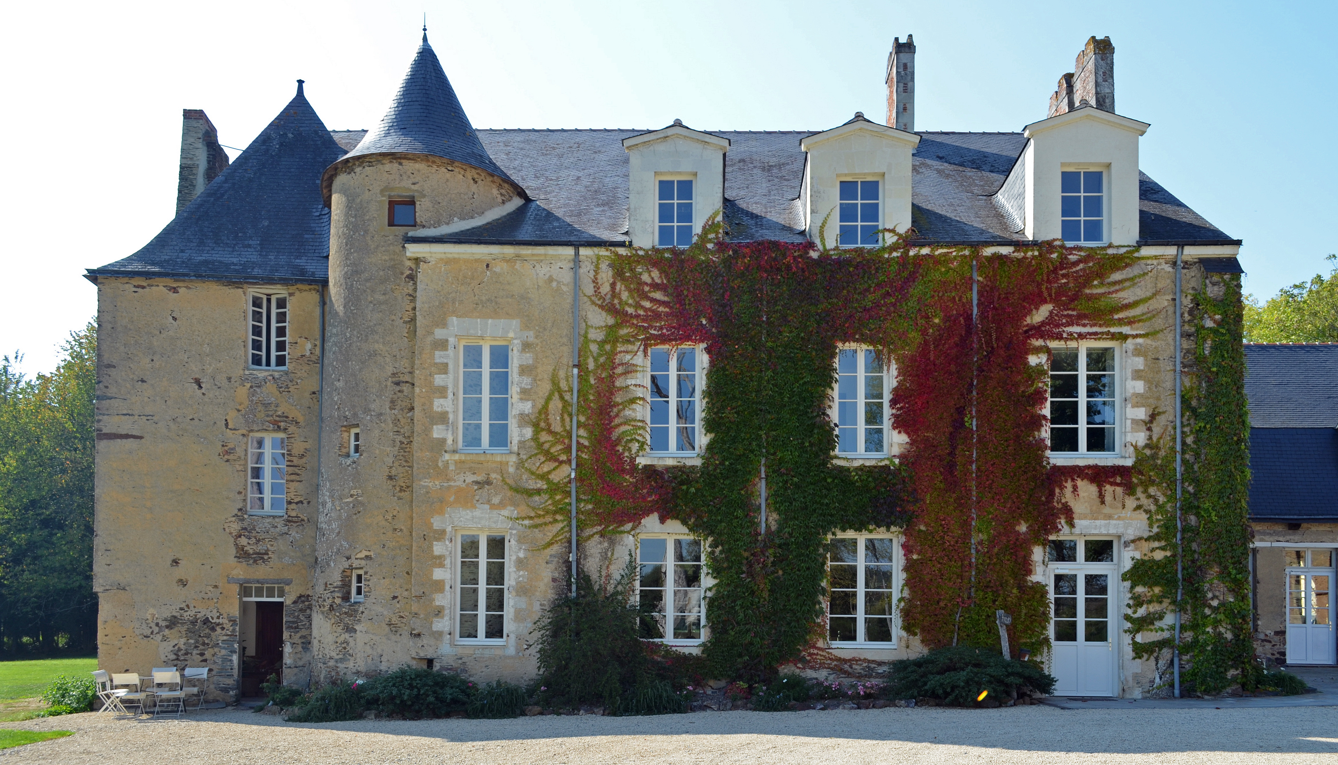 Anciennes forges de la Jahotière - Abbaretz (Loire-Atlantique) This building is en partie classé, en partie inscrit au titre des Monuments Historiques. .